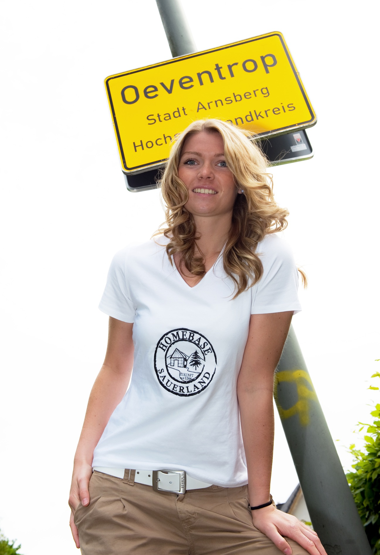 Helena Fromm vor den Ortsschild von Oeventrop.